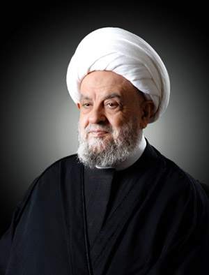 سماحة الامام الشيخ عبد الأمير قبلان